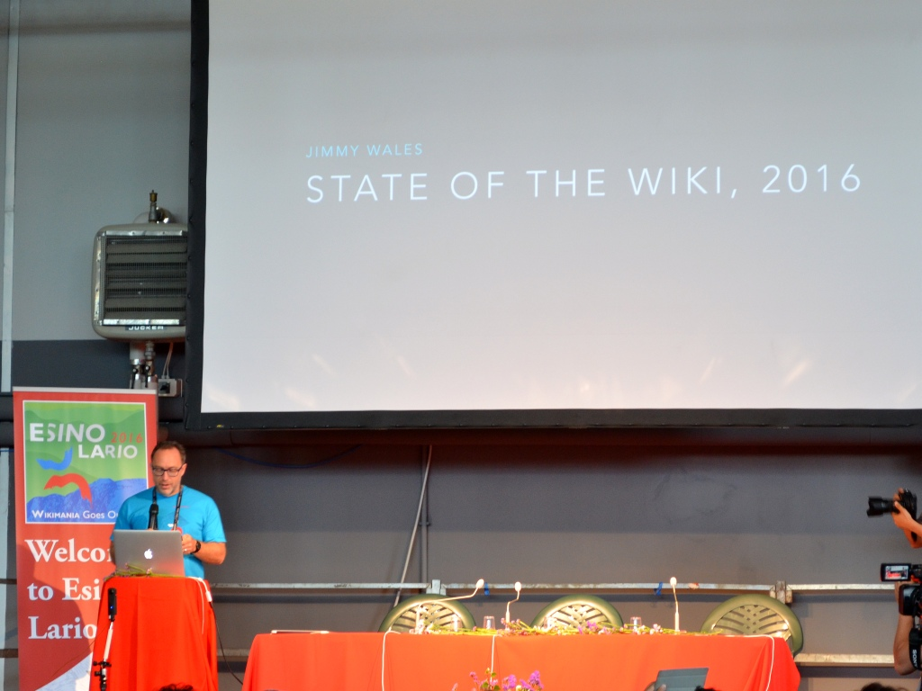 jimmy Jimbo Wales Esino Lario Wikimania 2016